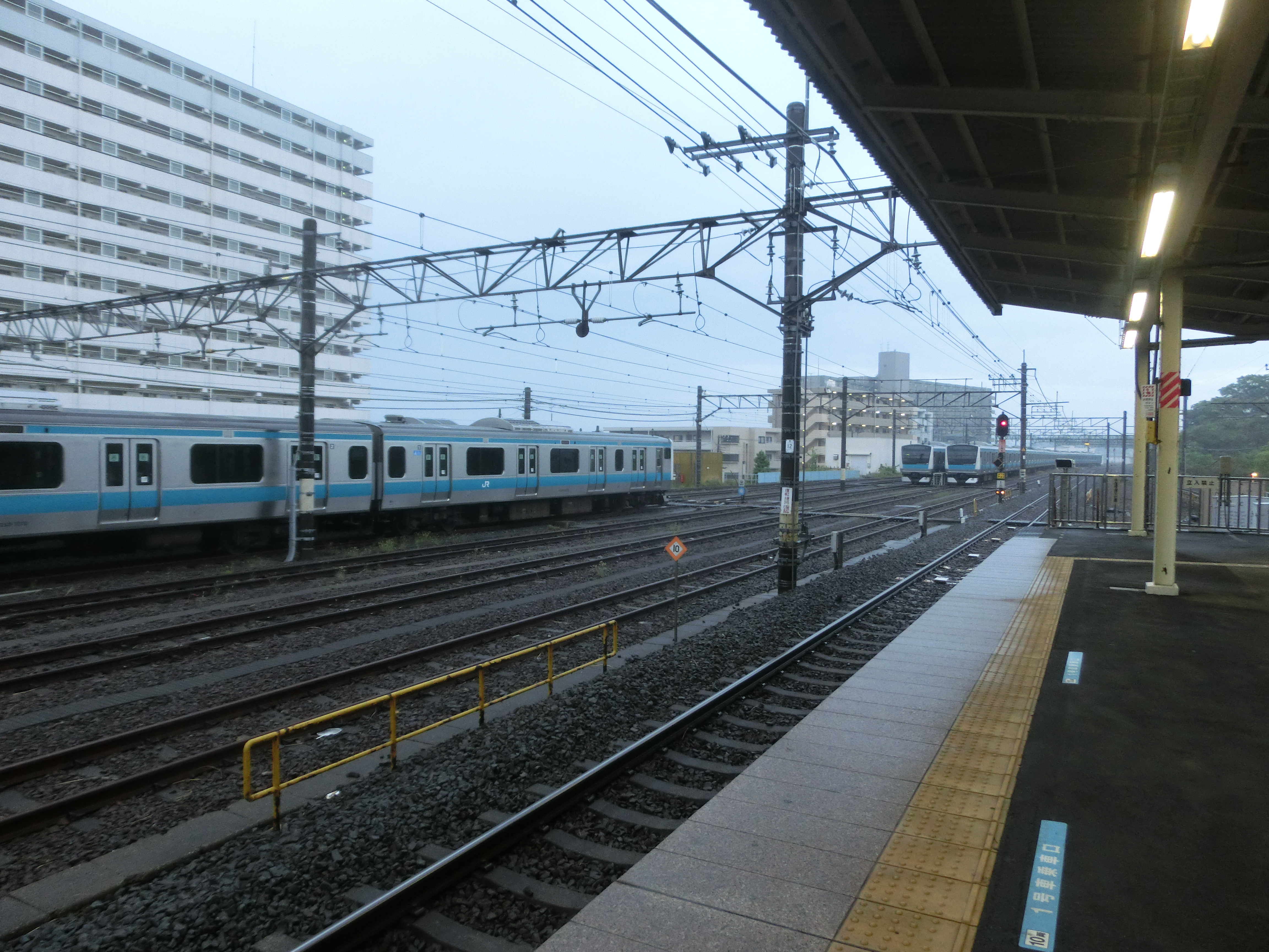 大船駅始発運用前に、本郷台駅構内に留置されている根岸線の車両